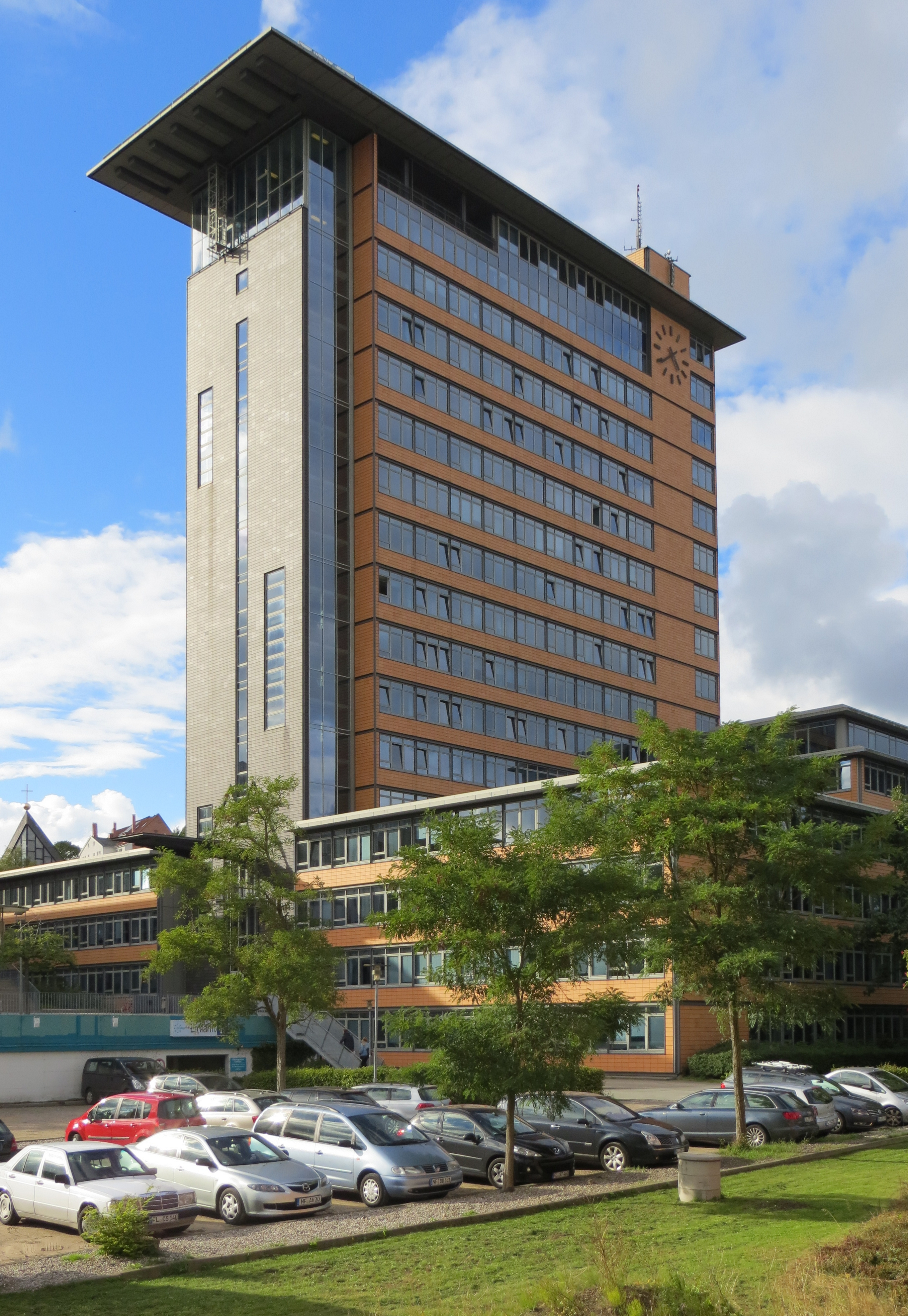 Rathaus im Sommer, Flensburg 2013, Bild 7